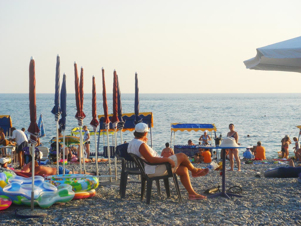 Дагомыс - "директор зонтиков"